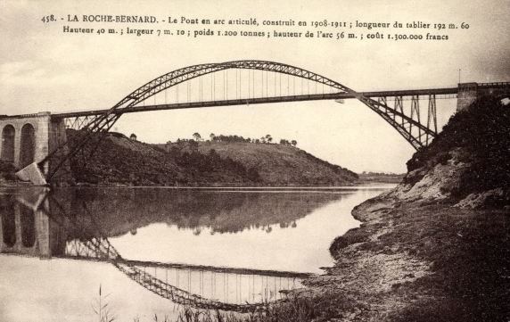 Le pont de La Roche-Bernard de 1911, Morbihan, France